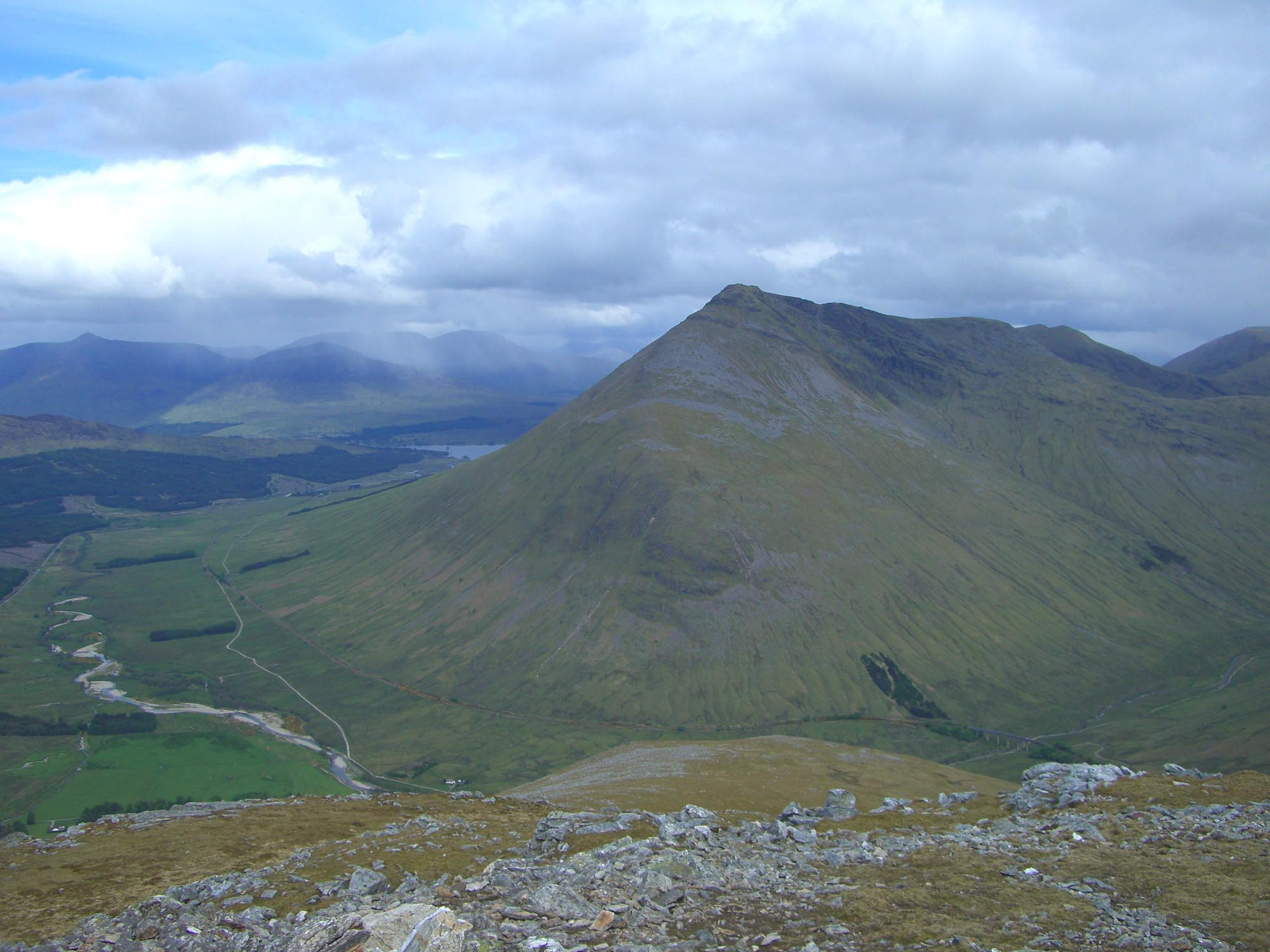 Beinn Dorain from Beinn Odhar, Scotland